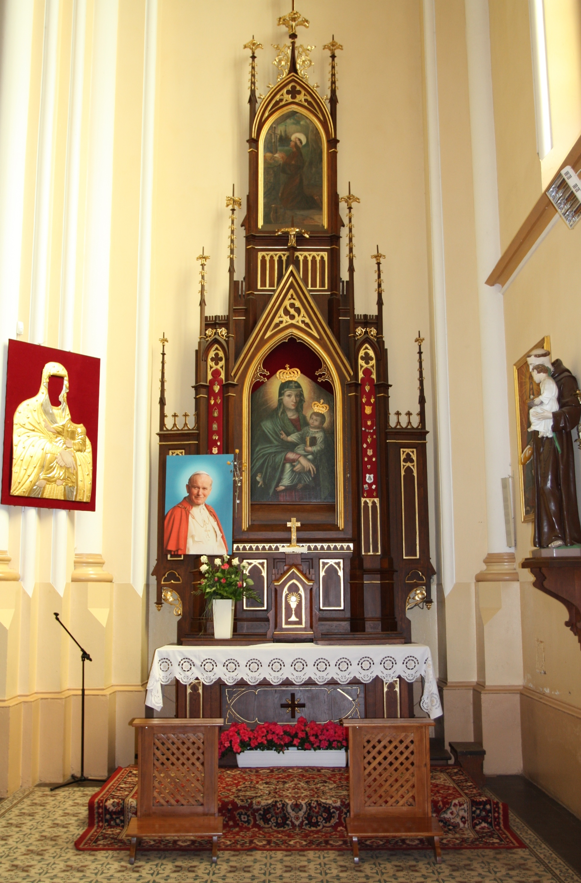 Ołtarz w nawie bocznej Matka Boska z Dzieciątkiem w kościele Św. Jana Chrzciciela w Sadownem